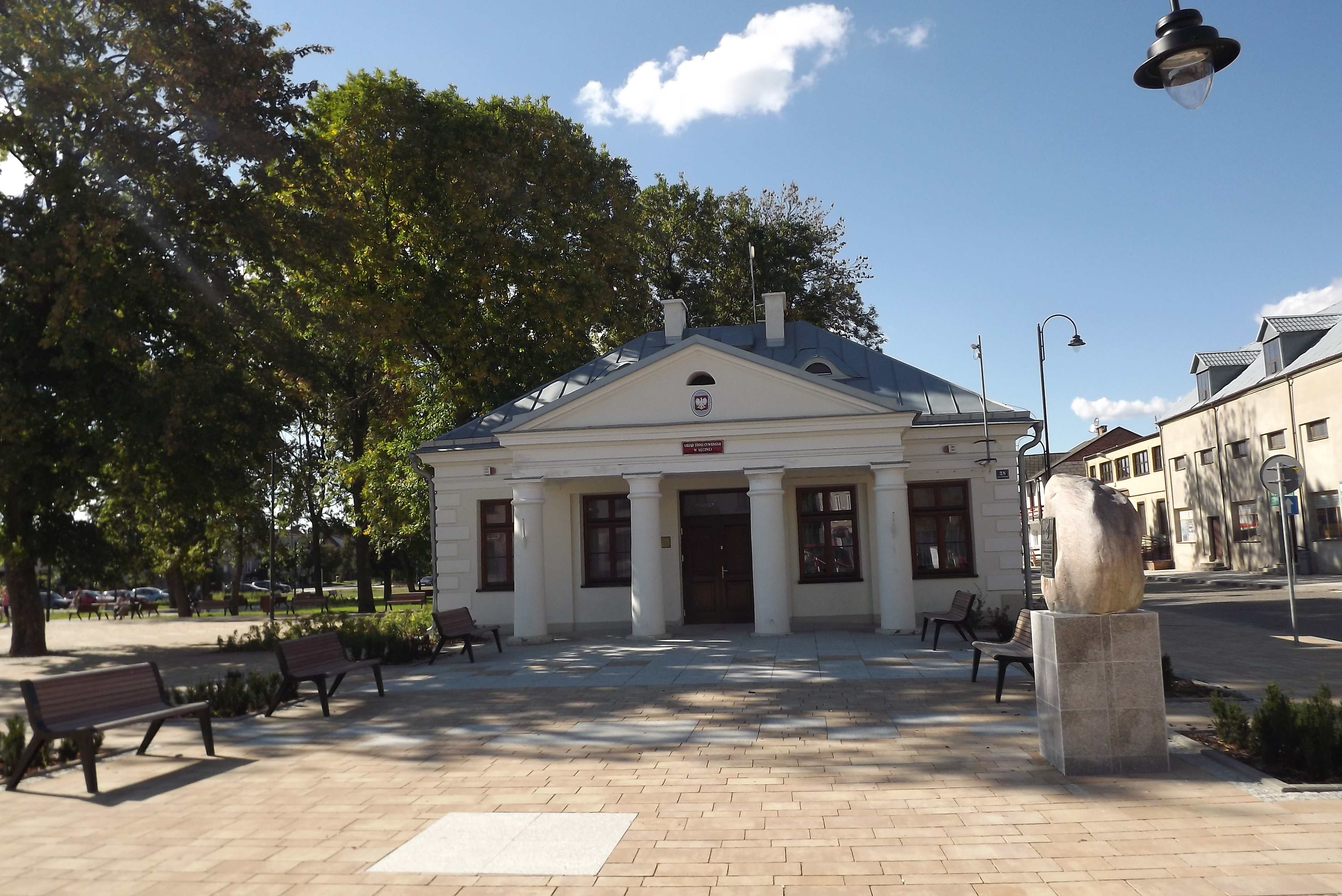 Łęczna, ratusz - wybudowany według planu opracowanego 15 stycznia 1888 r. z przeznaczeniem na odwach (wartownię).